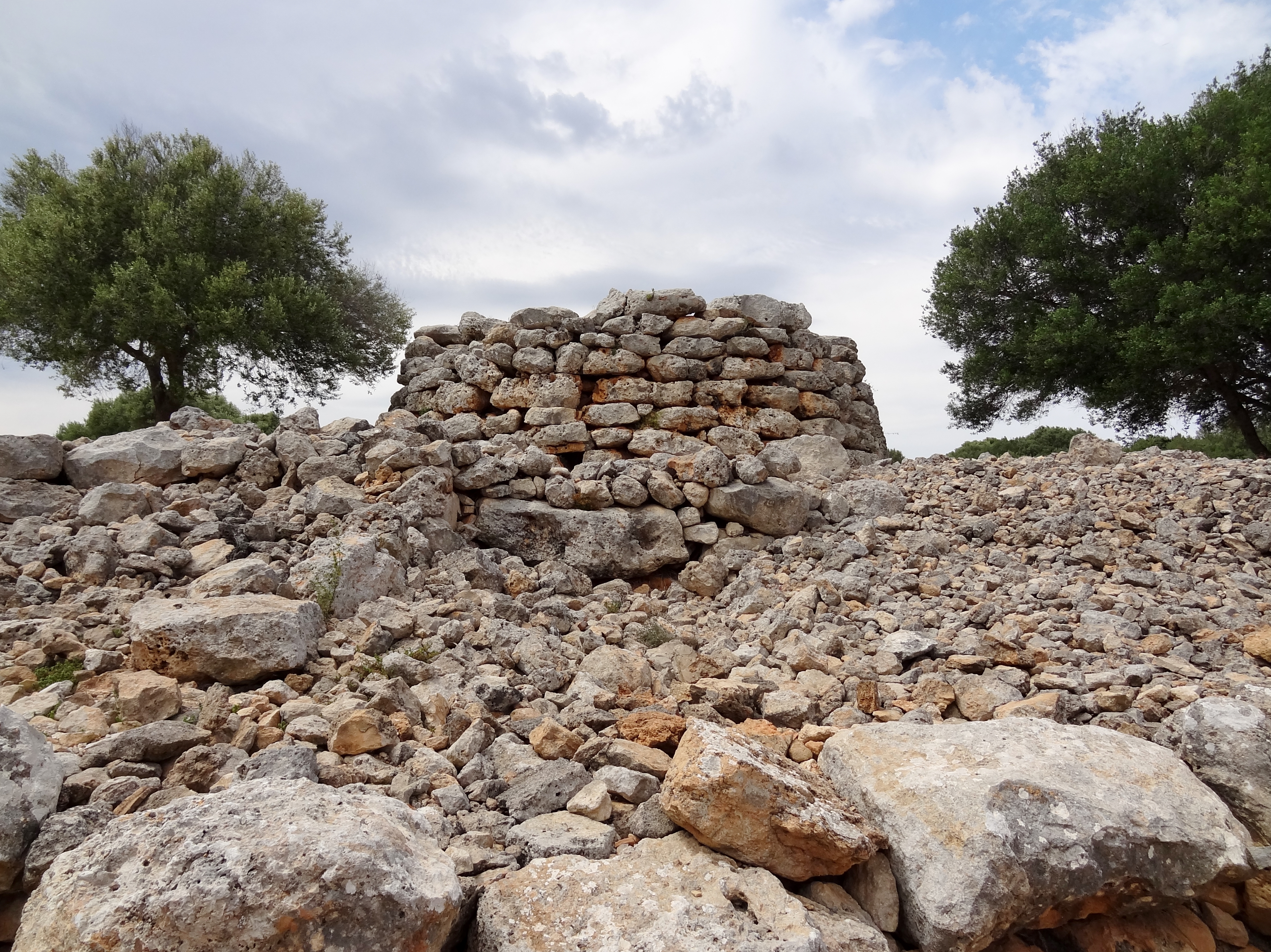 Runder Talaiot Nr. 1 in der Ausgrabungsstätte von Capocorb Vell, Gemeinde Llucmajor, Mallorca, Spanien